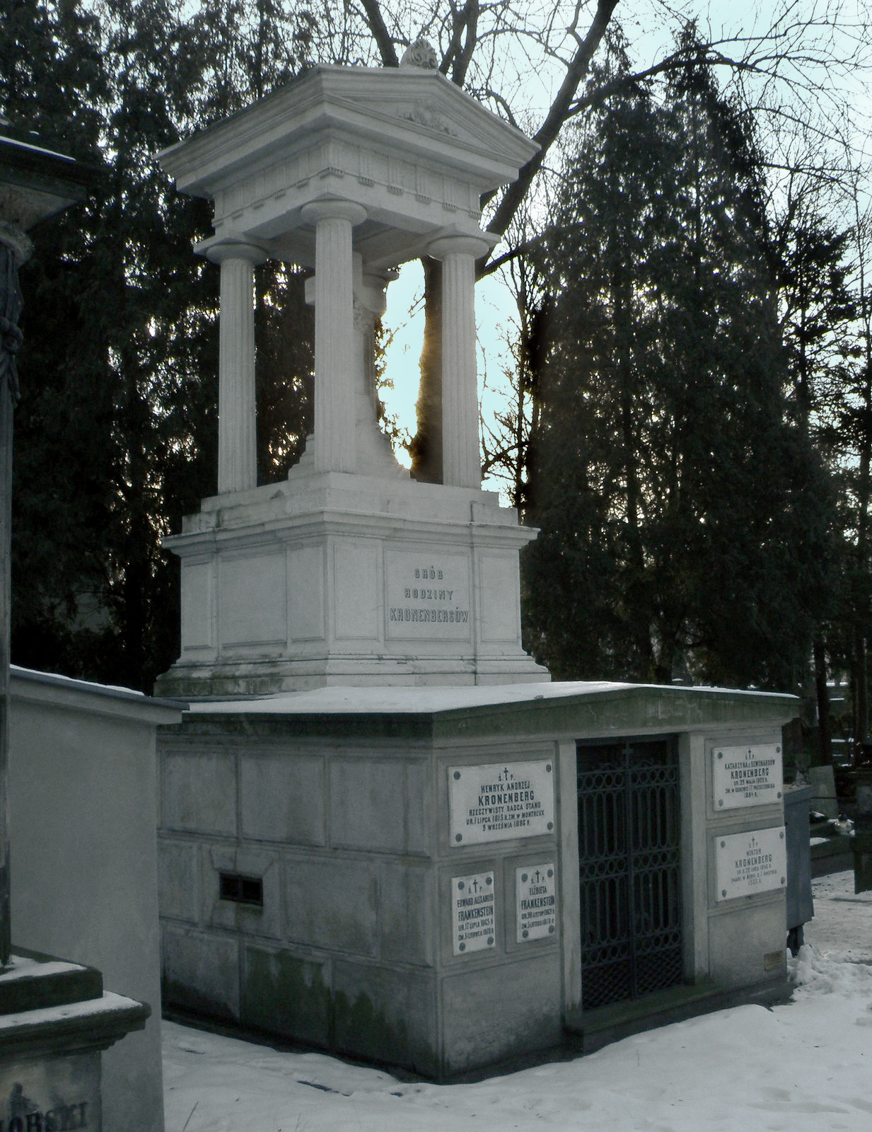 Henryk Andrzej Kronenberg, Cmentarz na Powązkach